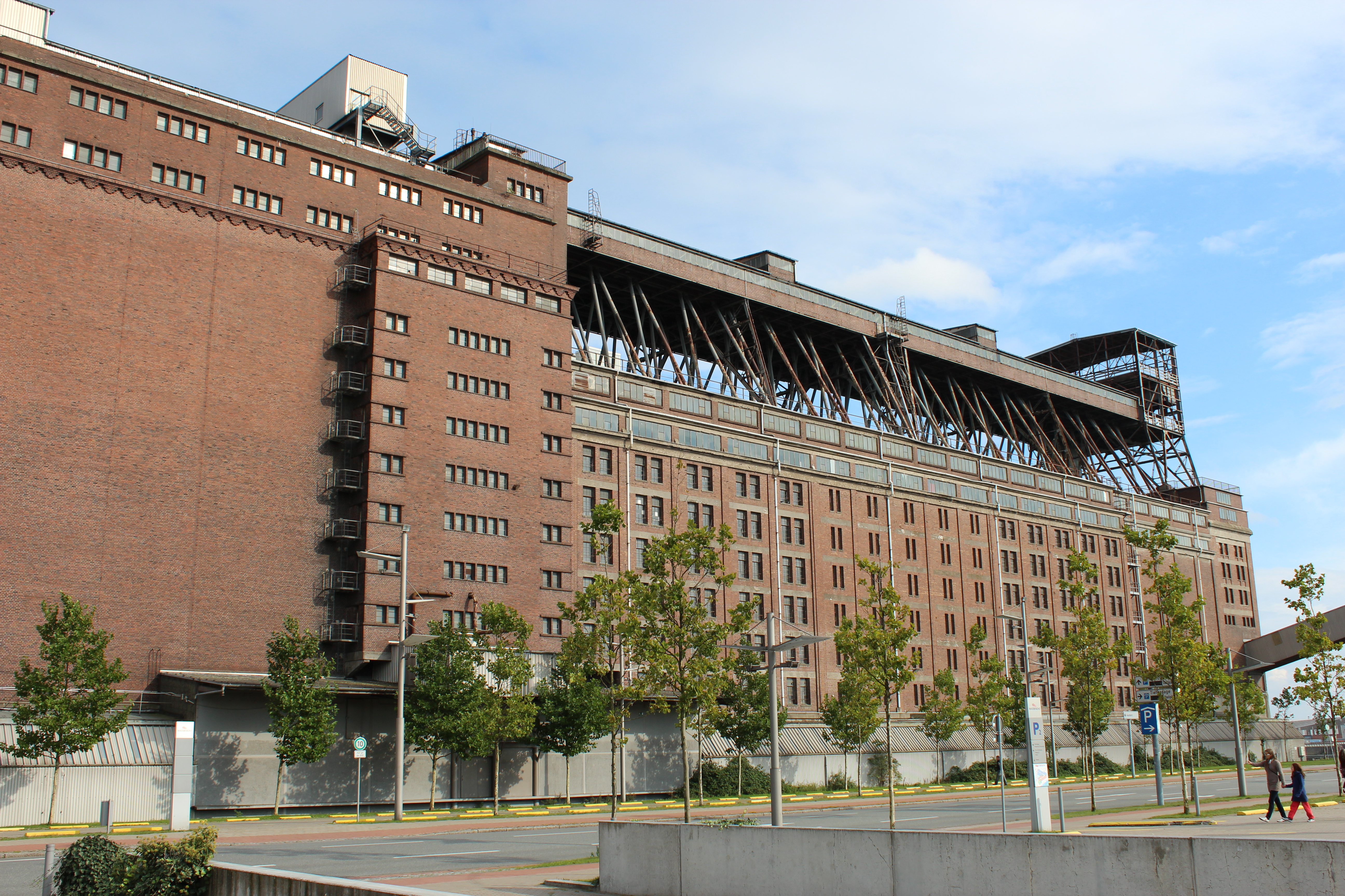 Getreideverkehrsanlage, Silo I in Bremen, Getreidestraße.Das abgebildete Objekt ist ein geschütztes Kulturdenkmal in der Freien Hansestadt Bremen, mit der Nr. 1749 beim Landesamt für Denkmalpflege registriert.